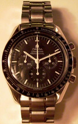 腕時計：オメガスピードマスター。利用者:Azuによる撮影。